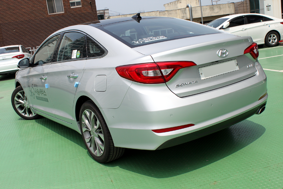 현대 쏘나타(LF) 후측면